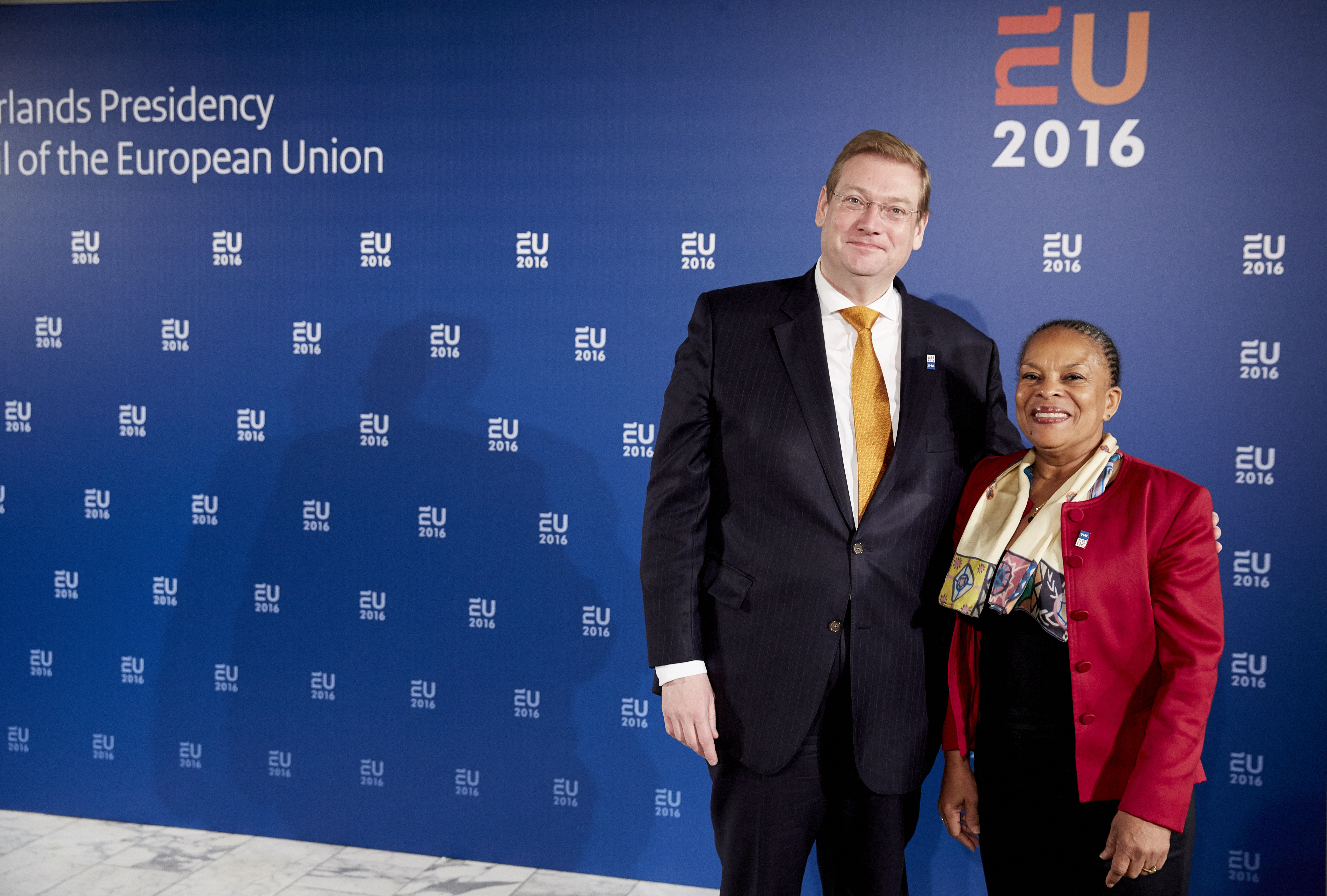 Amsterdam, 26 januari 2016 / Amsterdam, January 26th 2016. Minister Ard van der Steur De ministers van Veiligheid en Justitie en Binnenlandse Zakenvan de Europese Commissie bij het Scheepvaartmuseum in Amsterdam. The ministers of Justices and Home Affairs of the European Commission at the Scheepvaartmuseum in Amsterdam by boat. Foto: Rijksoverheid/Martijn Beekman – Photograph: Dutch Government/Martijn Beekman